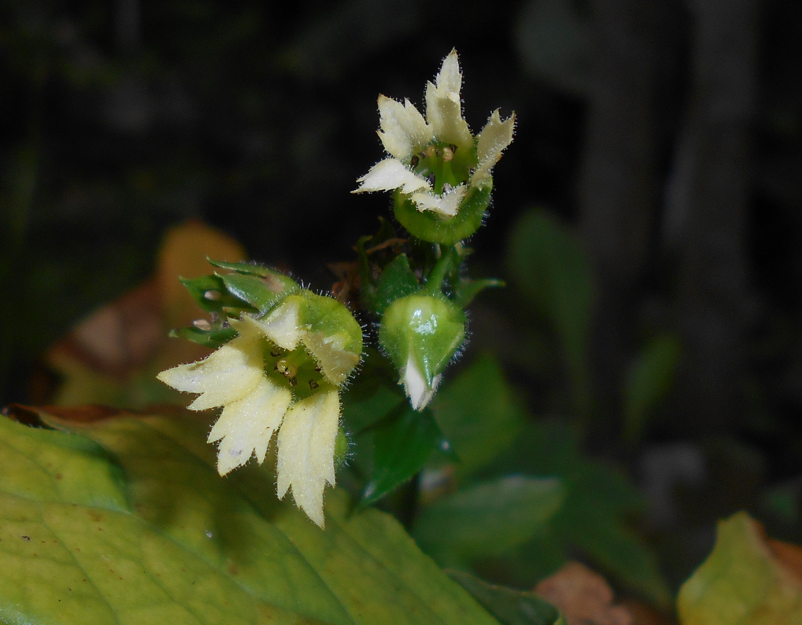 Peltoboykinia watanabei, Ogród Botaniczny UMCS w Lublinie.